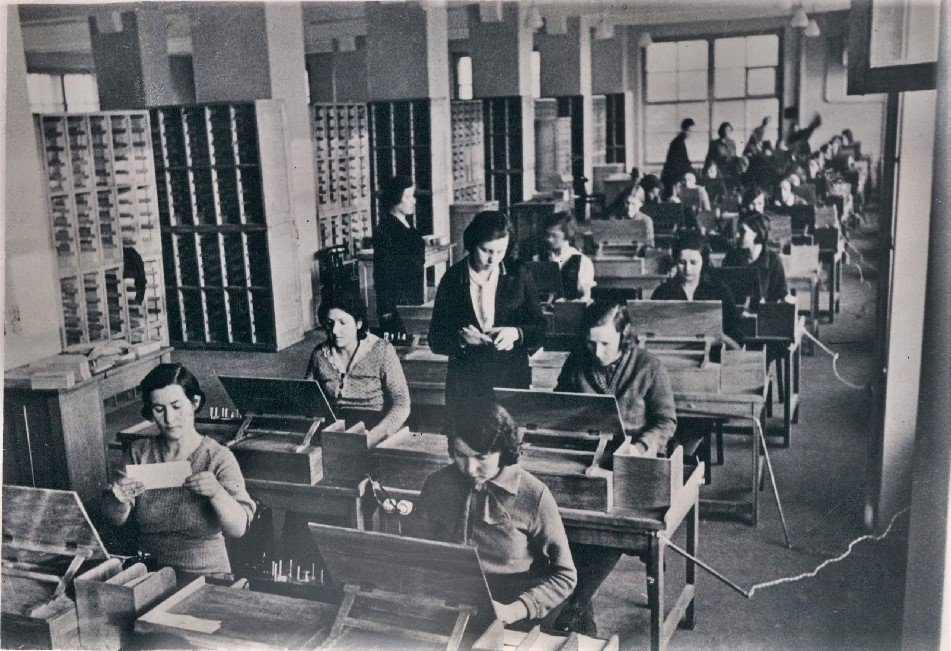 Обработка данных переписи.